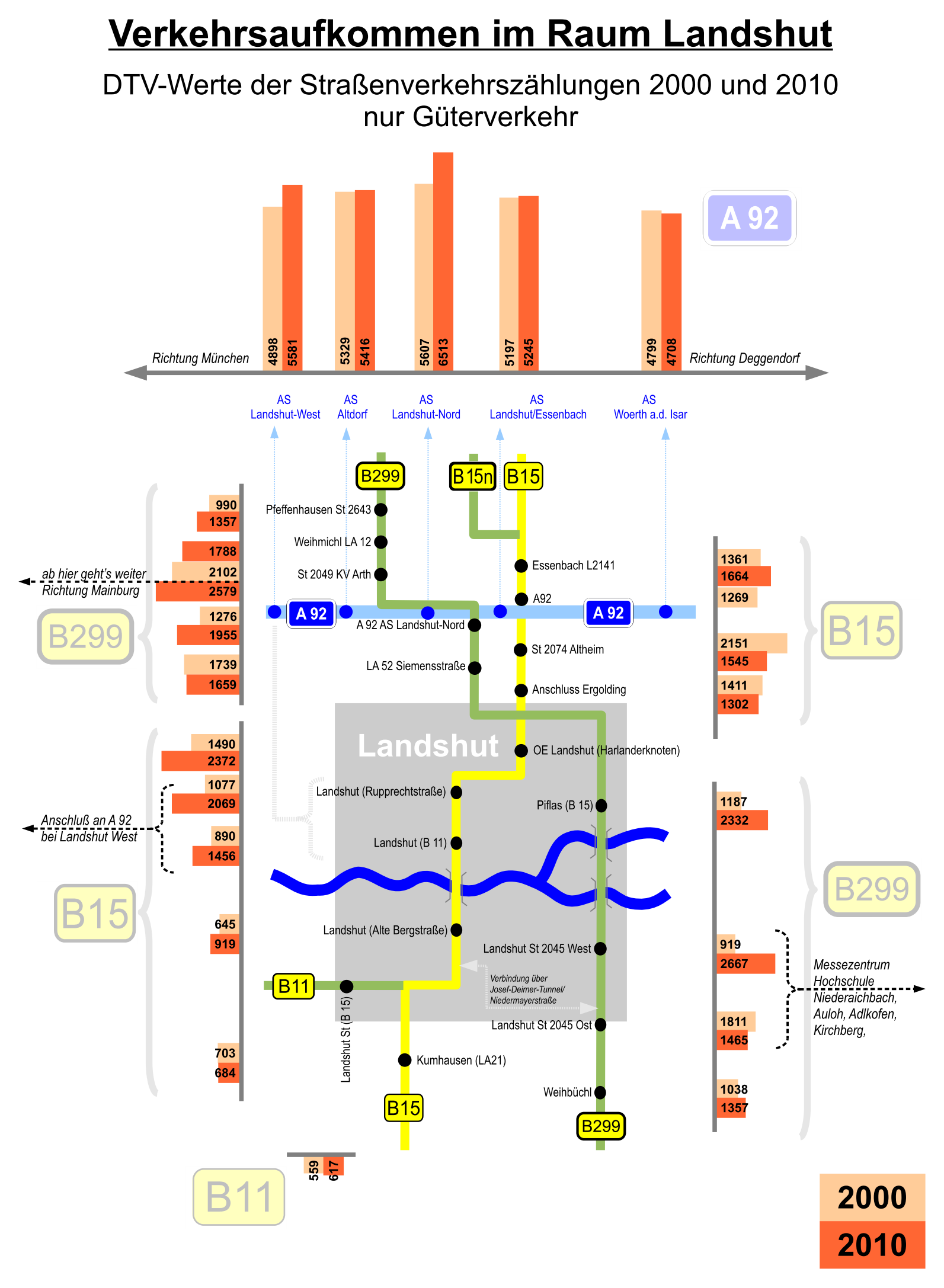 Darstellung der Verkehrsströme für den Güterverkehr im Bereich Landshut anhand der DTV-Werte aus den Verkehrszählungen 2000 und 2010